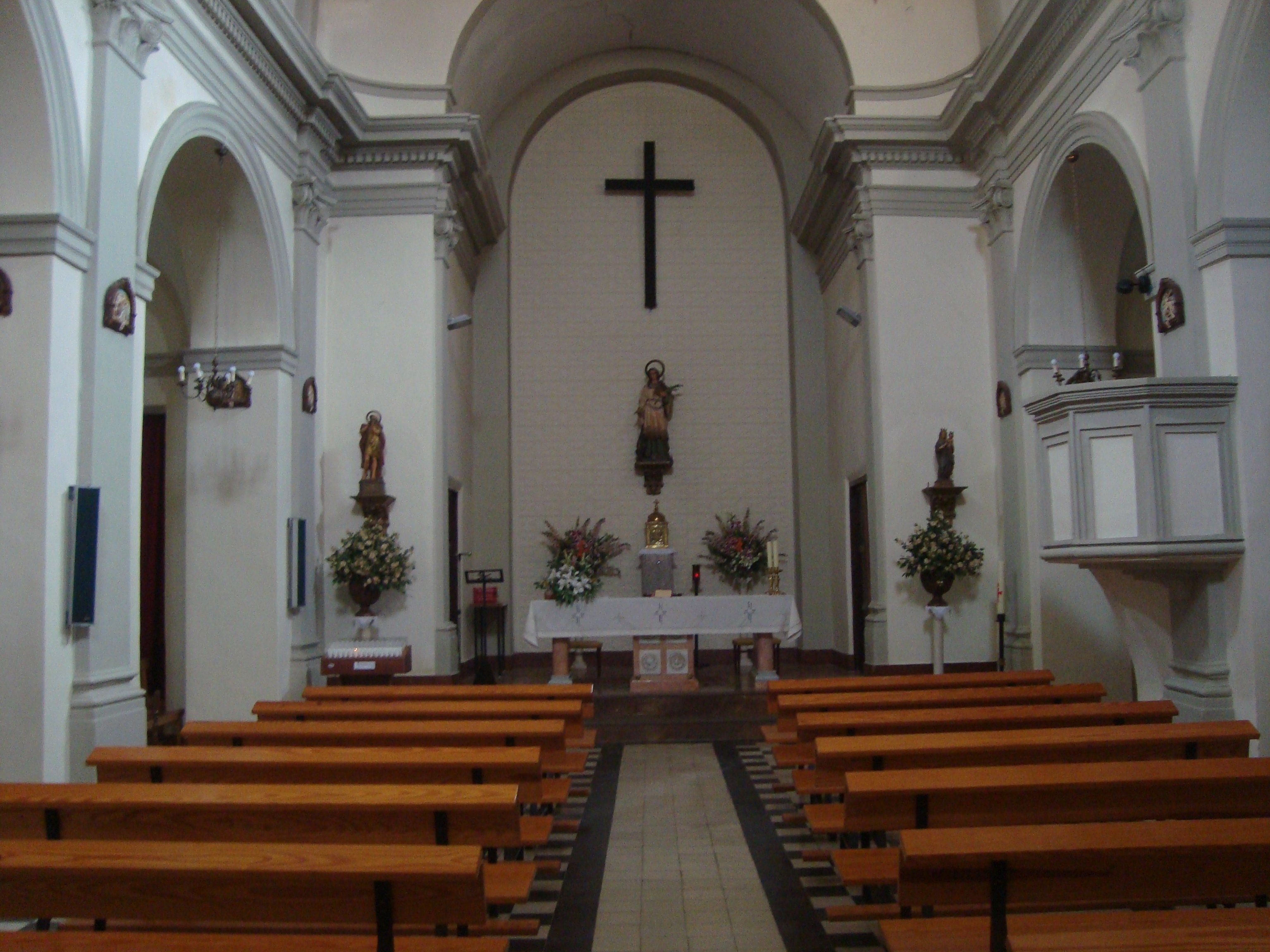 Església parroquial de Santa Quitèria (la Torre d'en Doménec) 05.120-001.